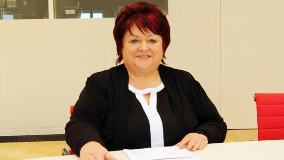 SPD Landtagsabgeordnete Gabriele Theiss